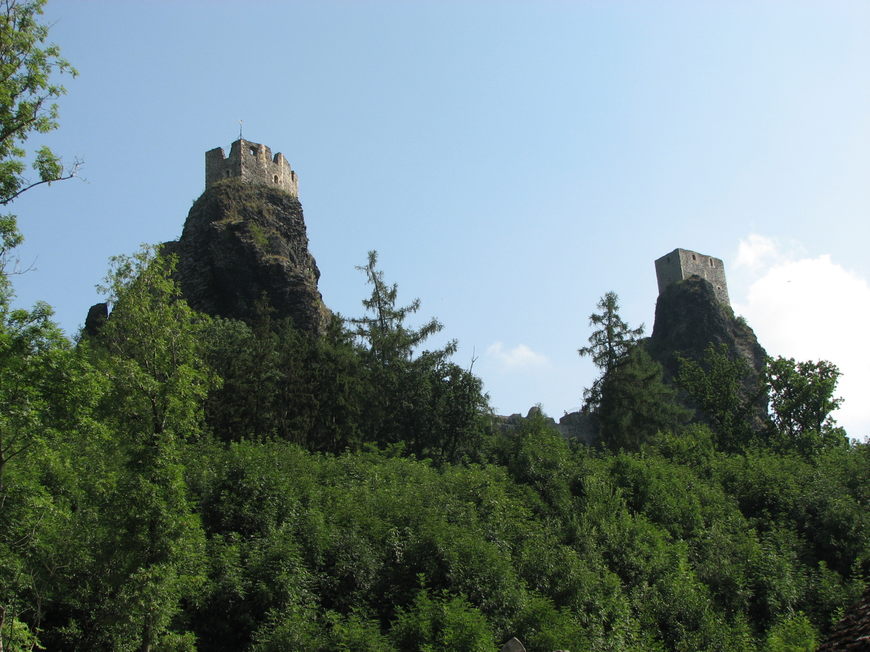 Hrad Trosky, zřícenina (Troskovice), Troskovice